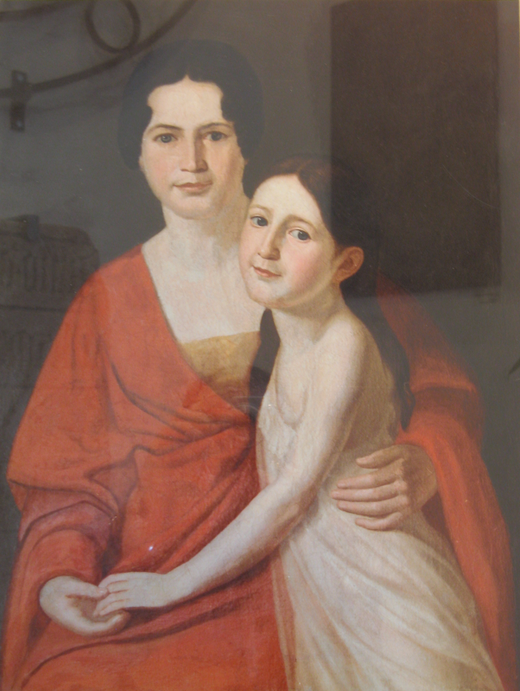 Josefine Haas von Längenfeld-Pfalzheim mit ihrer Tochter Louise (Bürgermeisteramt Burglengenfeld)